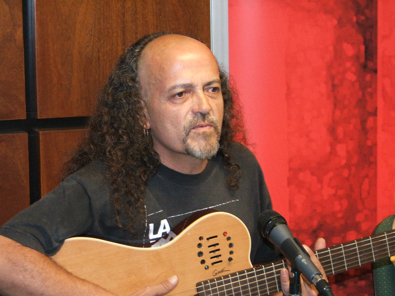 El Mastuerzo, durante la Feria Internacional del Libro de Guadalajara (México) 2005.